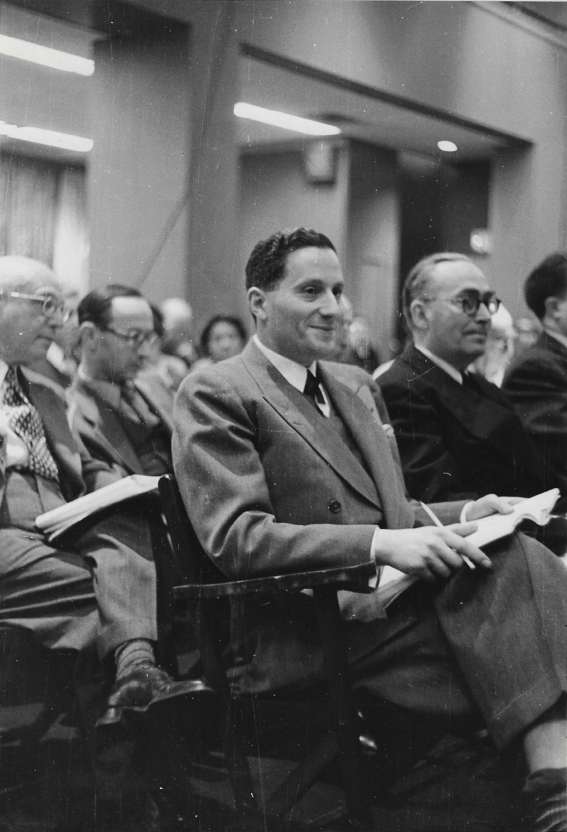 Pierre Berès lors d'une vente aux enchères